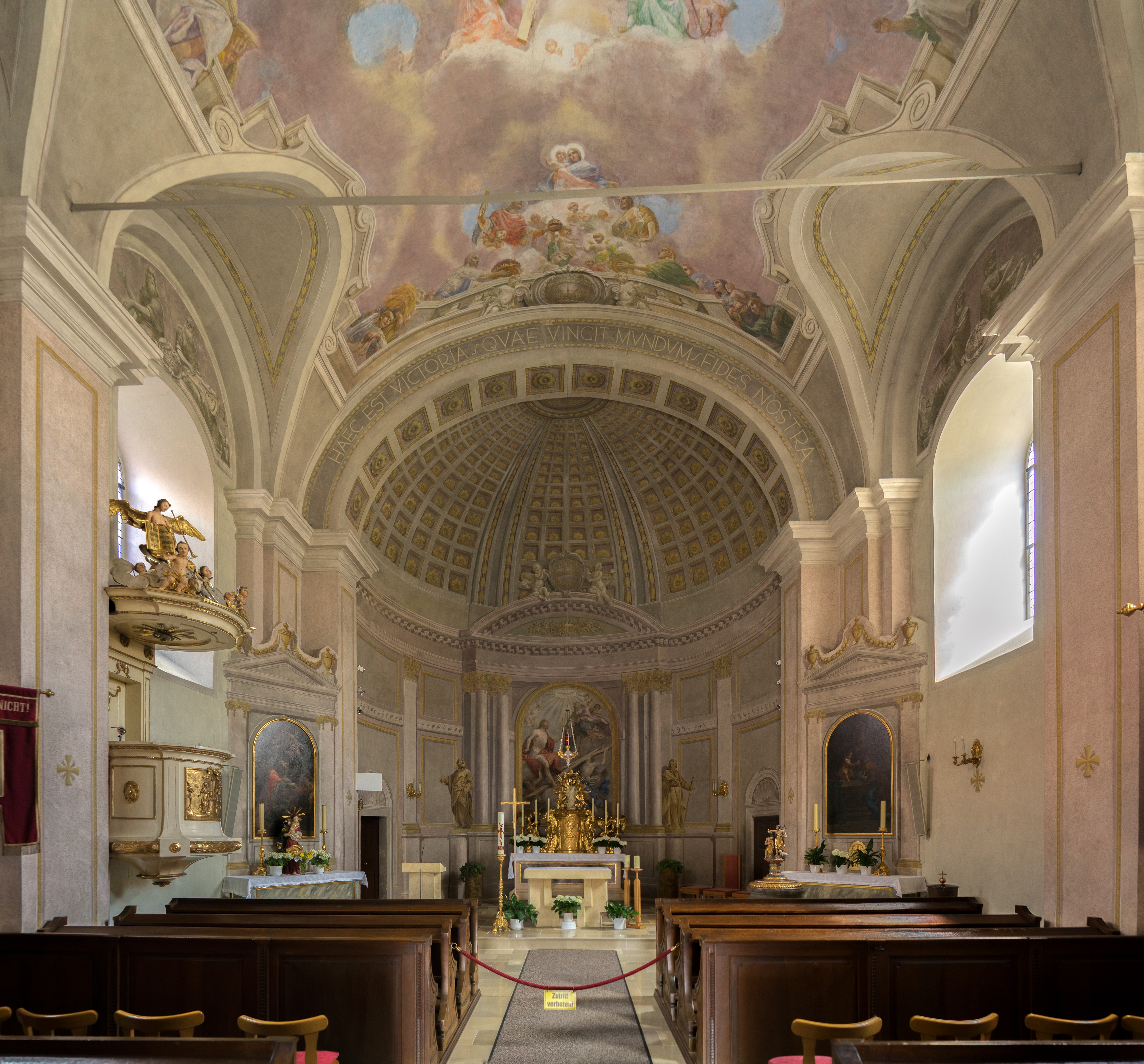 Pfarrkirche Rust am See